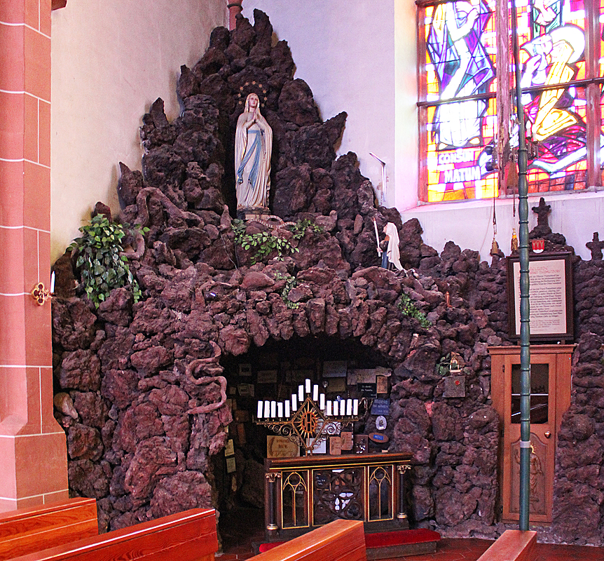 Lourdesgrotte im Innenraum der katholischen Pfarrkirche St. Rufus in Niedaltdorf, Gemeinde Rehlingen-Siersburg, Landkreis Saarlouis, Saarland.